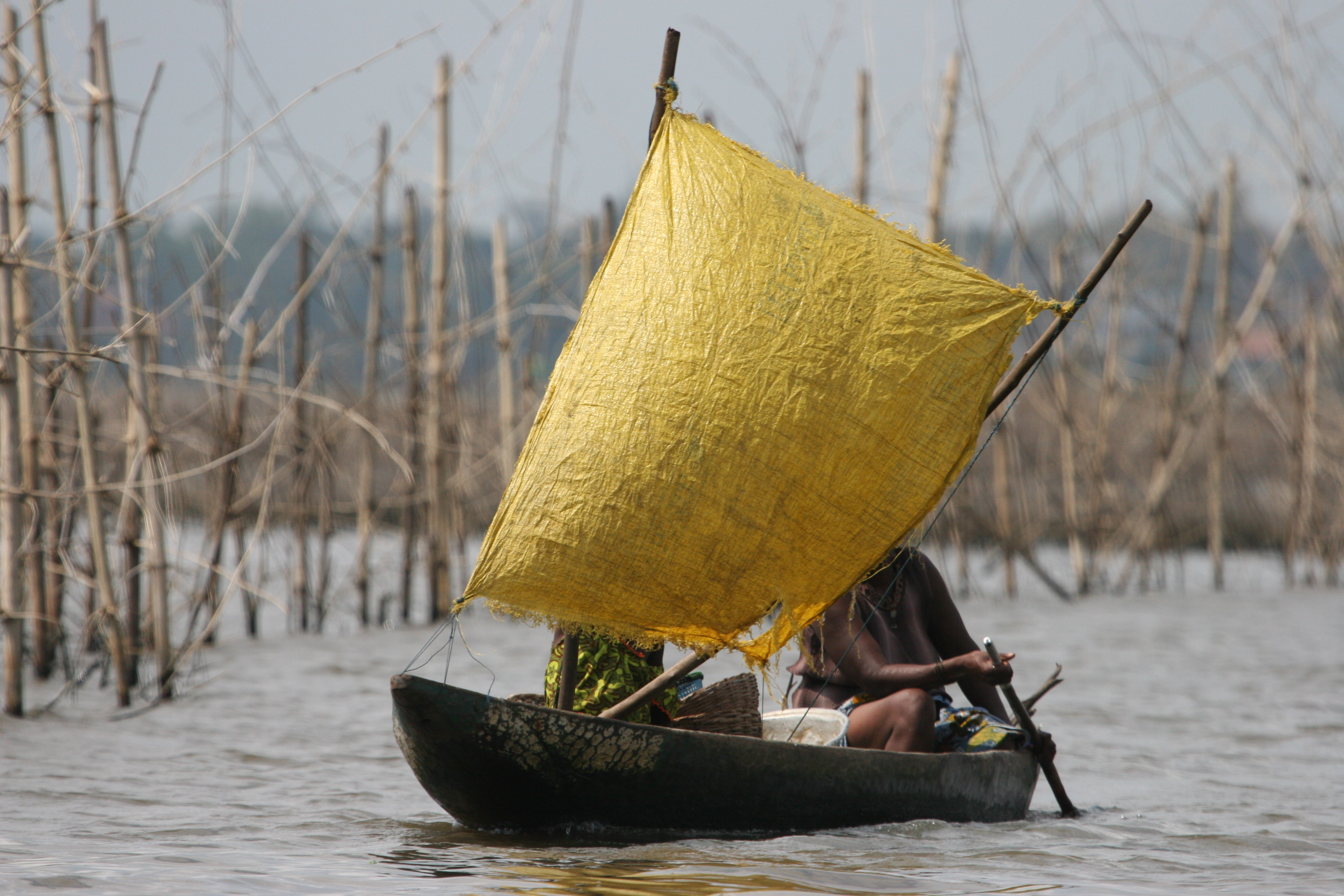 Bénin